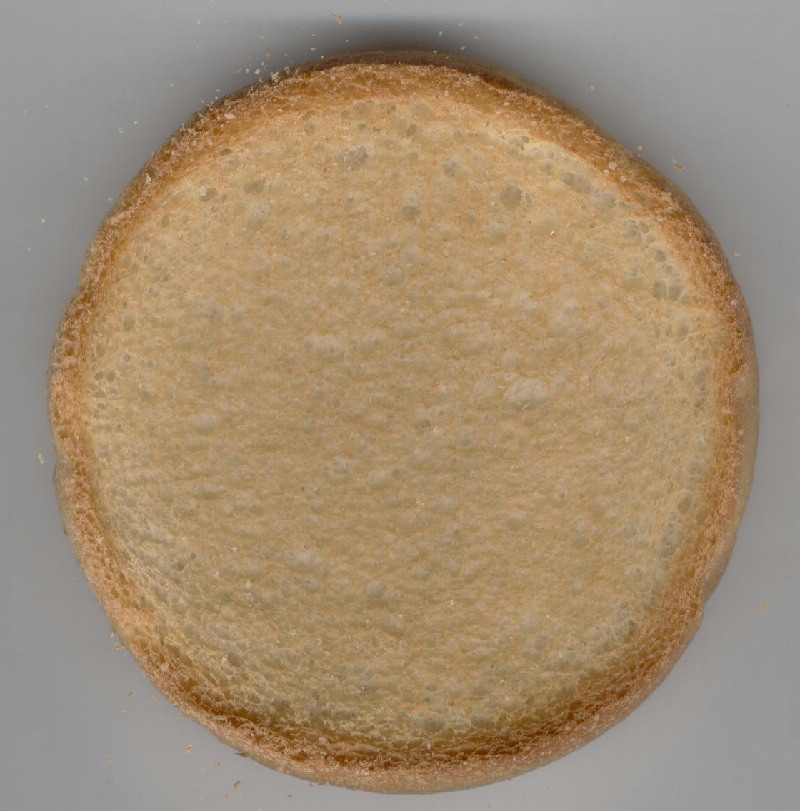 Beschuit is een lichtverteerbare broodvervanger. Eigen werk.